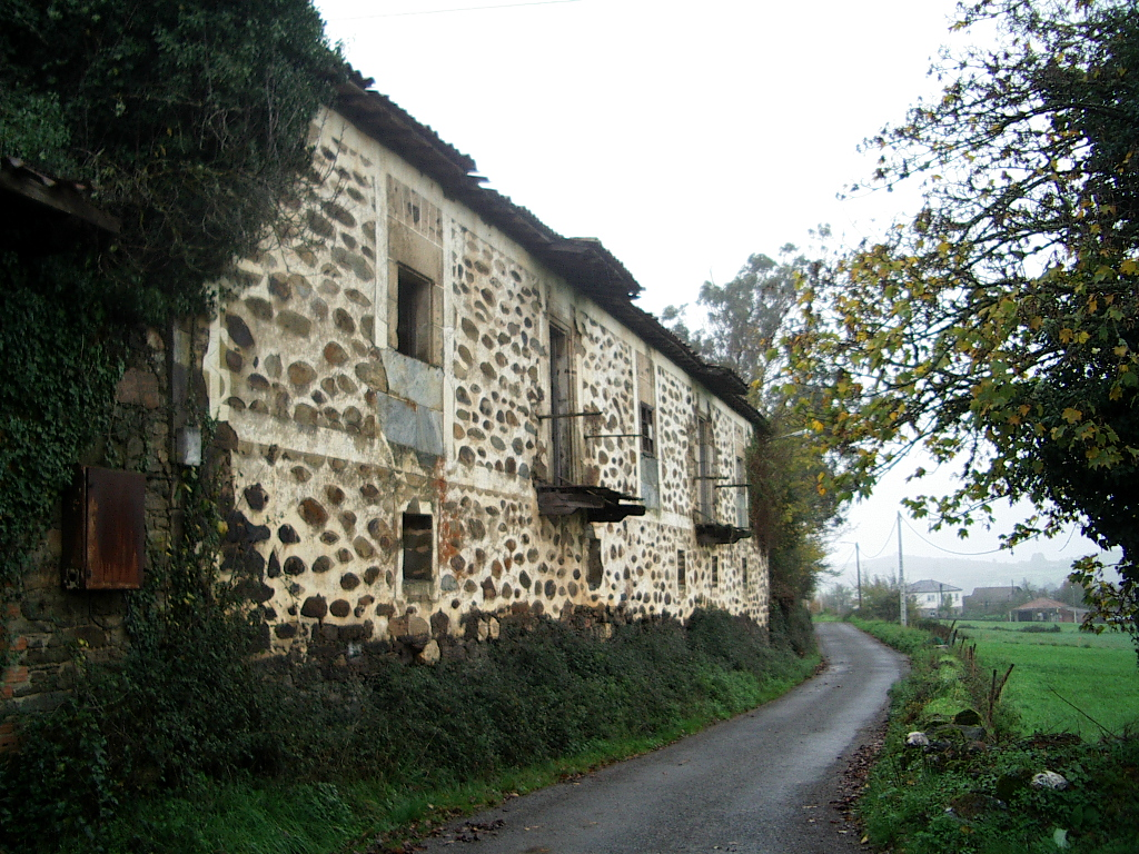 Cada de la Abadia en San Vitorio de Ribas de Mino en O Savinao (Lugo, Espana). Picture taken by me in November 2006.